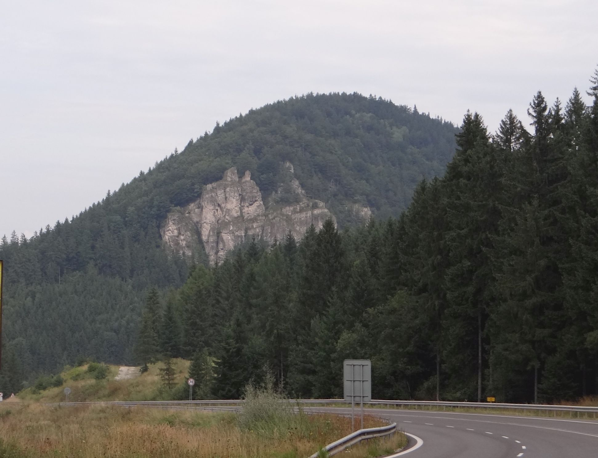 Komjatná i skała Kostoly